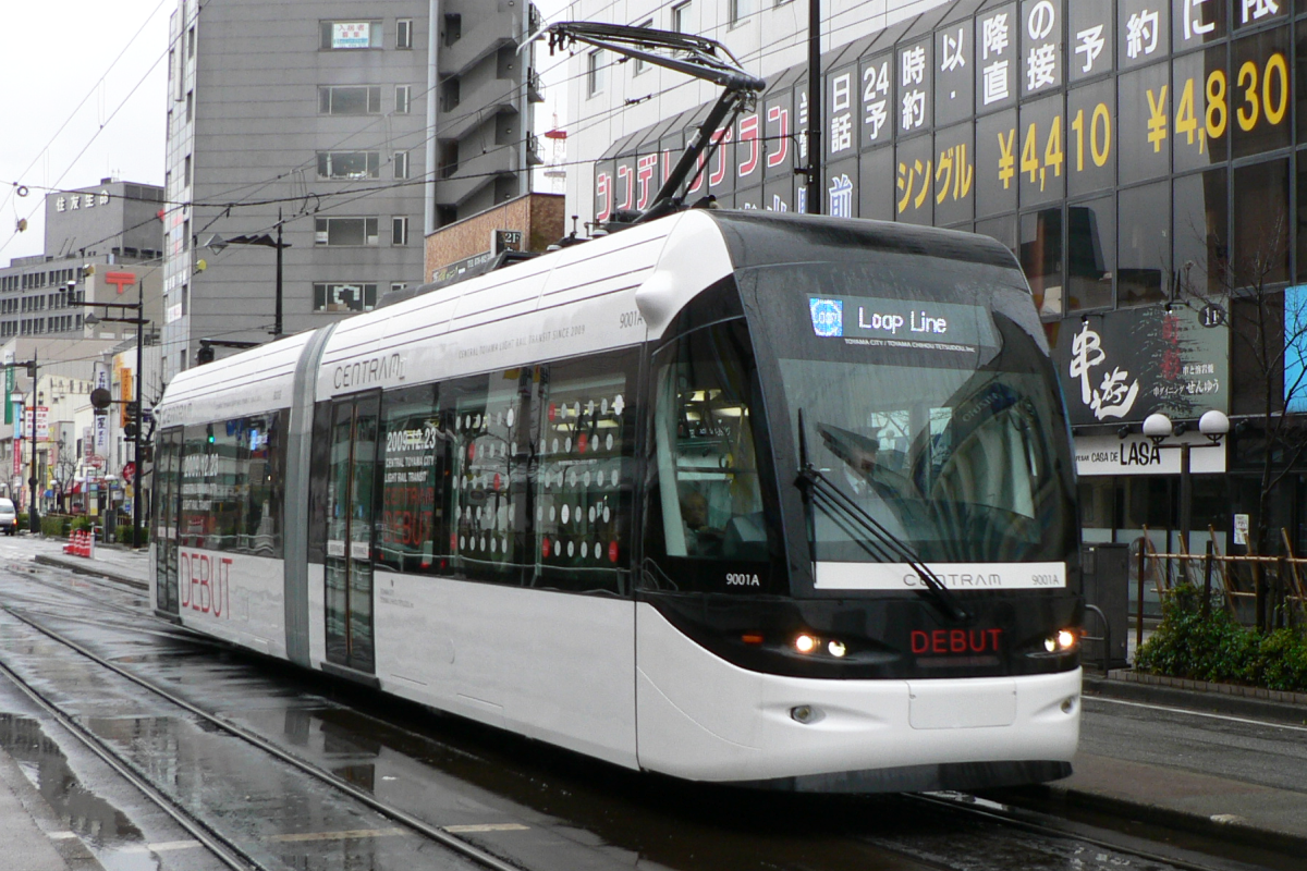 富山地方鉄道9000形電車(セントラム)